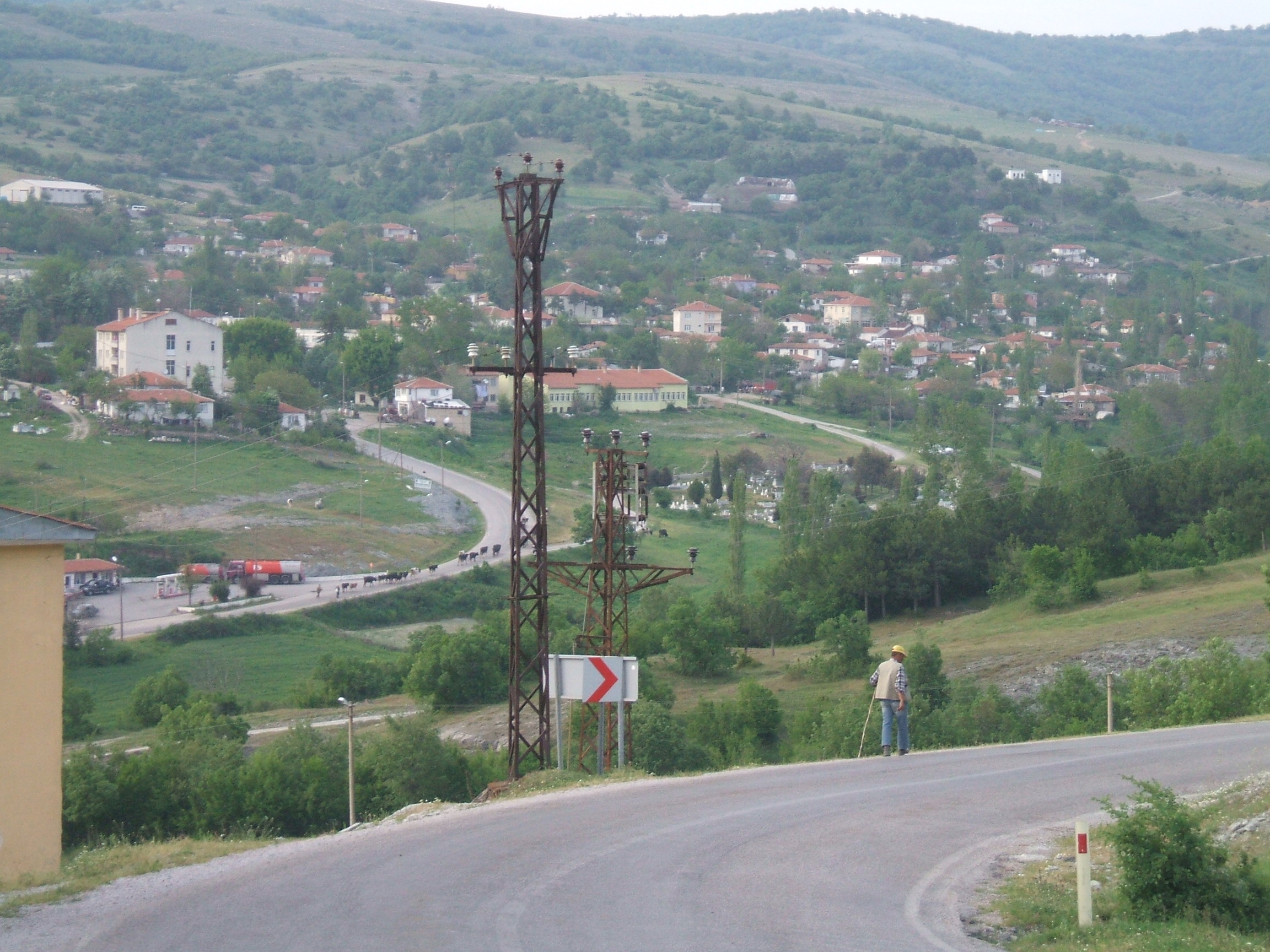 Kofcaz